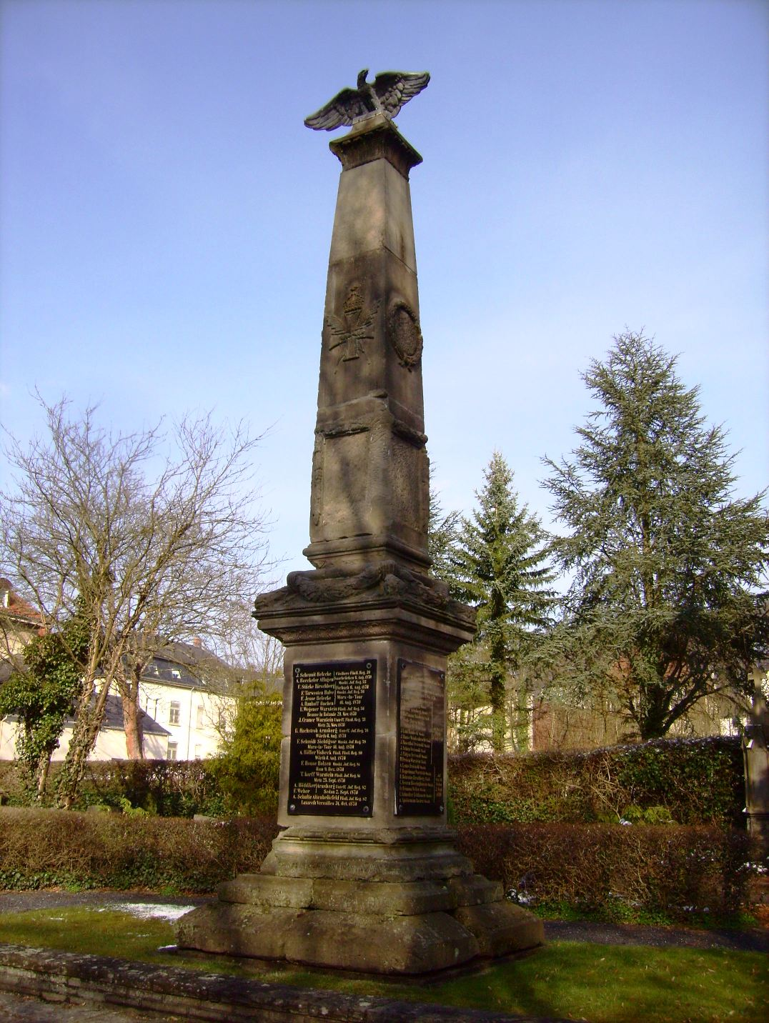 Altes Ehrenmal für Gefallene der Kriege 1864-1871 auf Eichholzfriedhof in Arnsberg (früher auf dem Neumarkt)